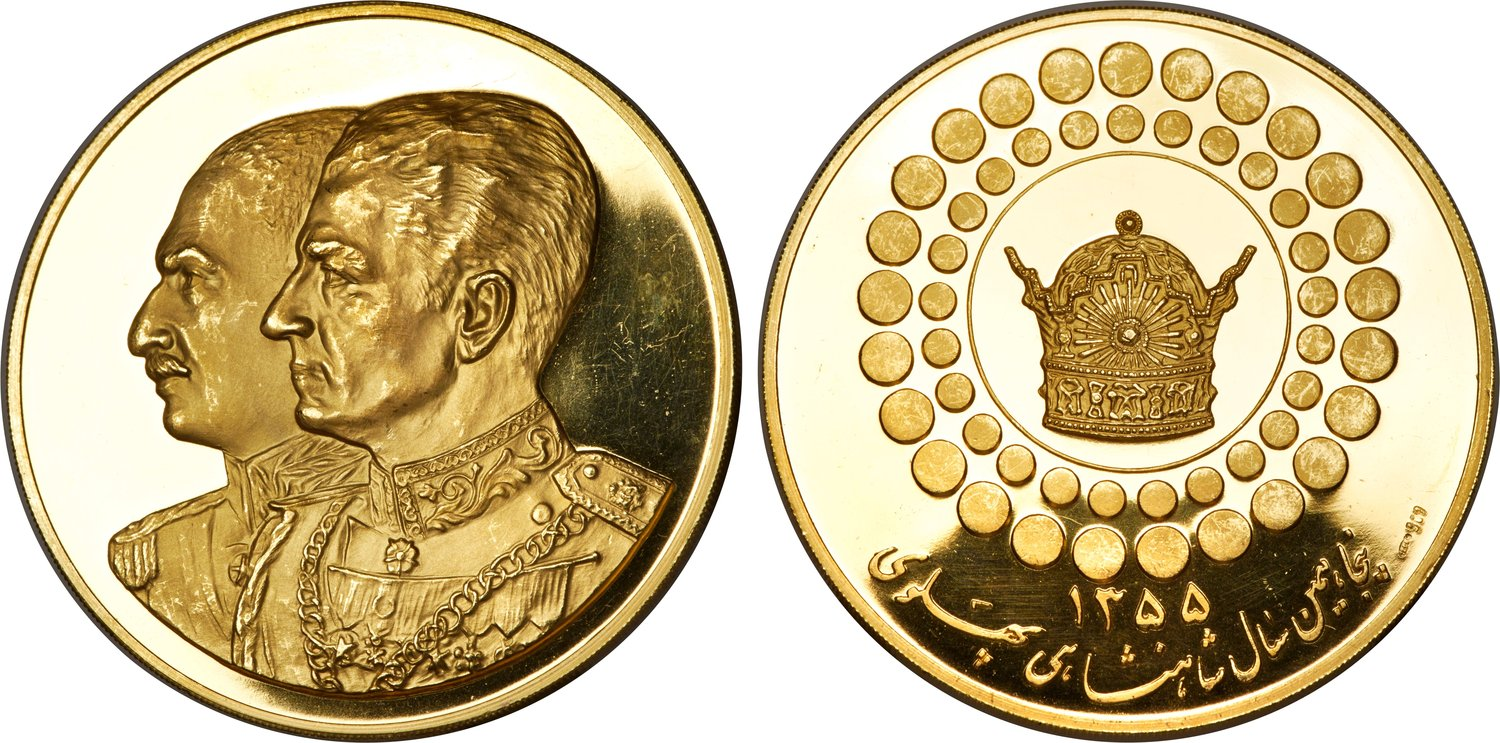 مدال طلای پادبود پنجاهمین سال شاهنشاهی پهلوی